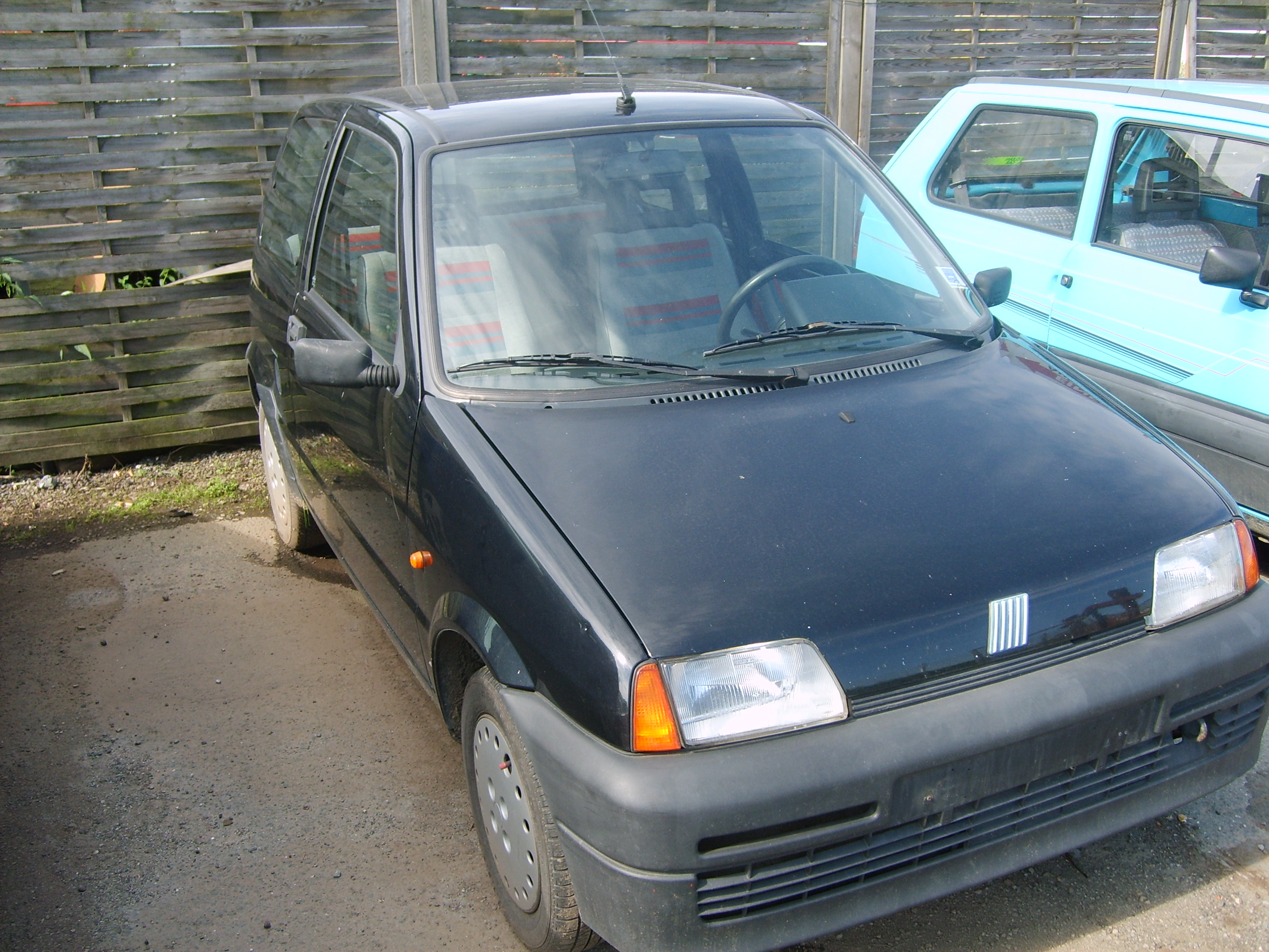 Fiat Cinquecento i.E. BJ 1993